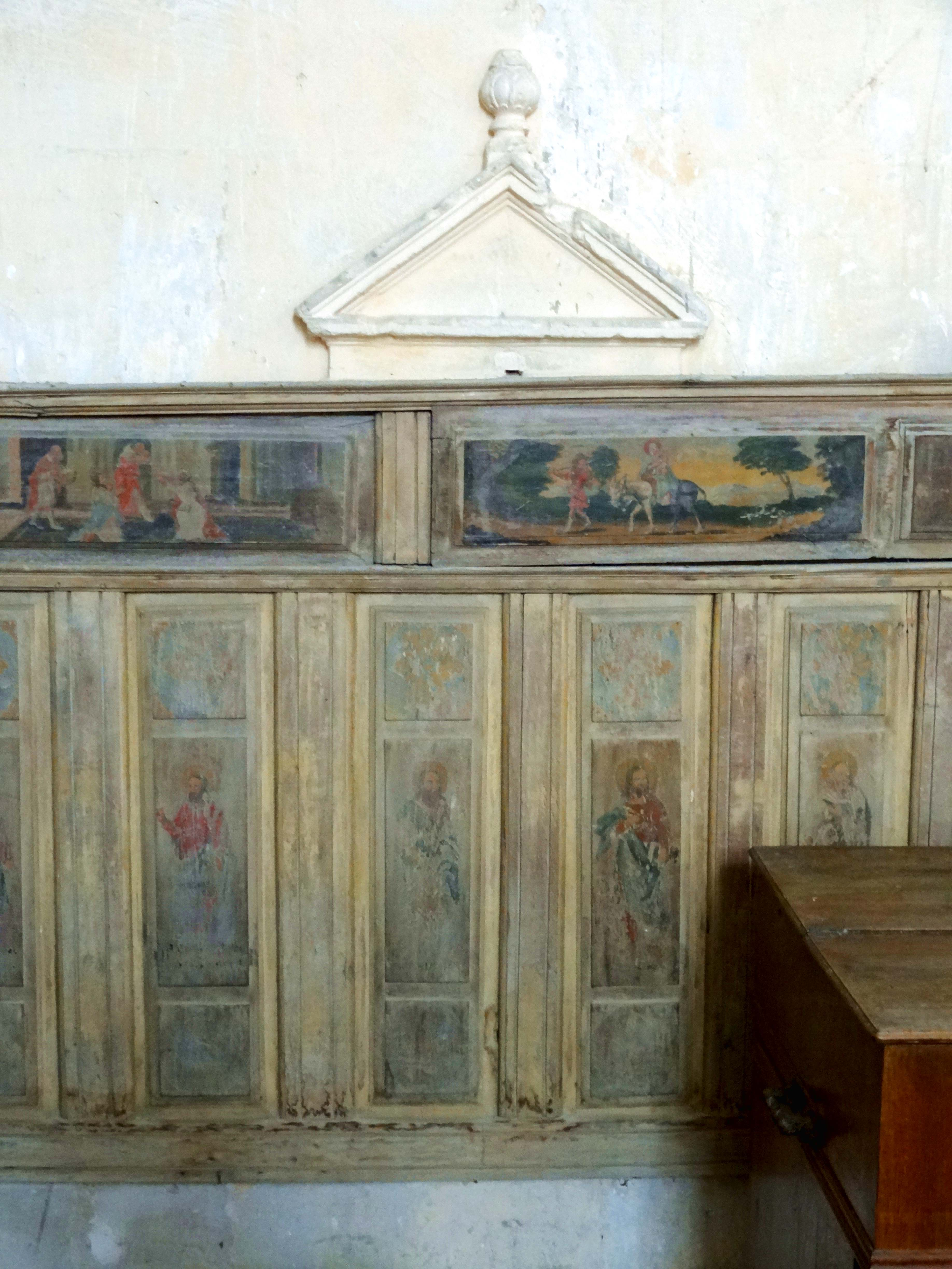 Mobilier de l'église - voir titre.